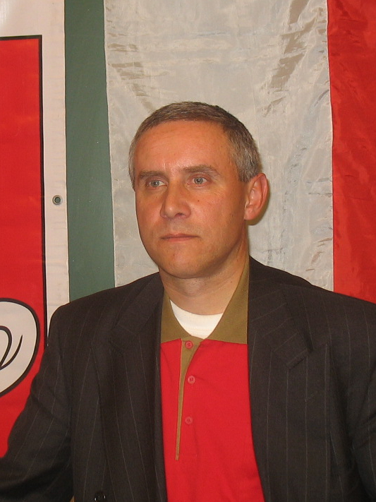 Sławamir Adamowicz, białoruski poeta i działacz polityczny, podczas spotkania na uniwersytecie Collegium Civitas w Pałacu Kultury i Nauki w Warszawie.